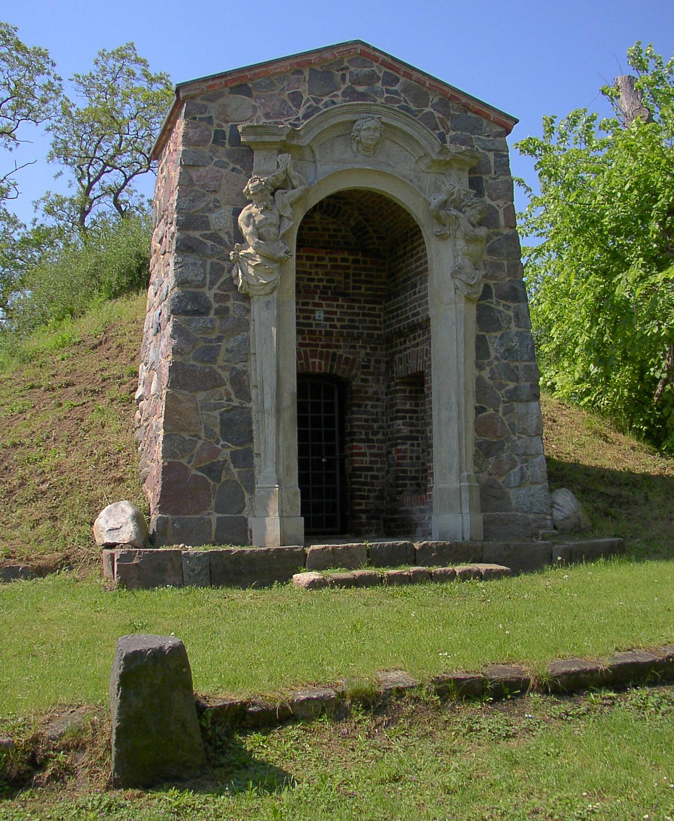 Eiskeller in Fehrbellin-Wustrau in Brandenburg, Deutschland